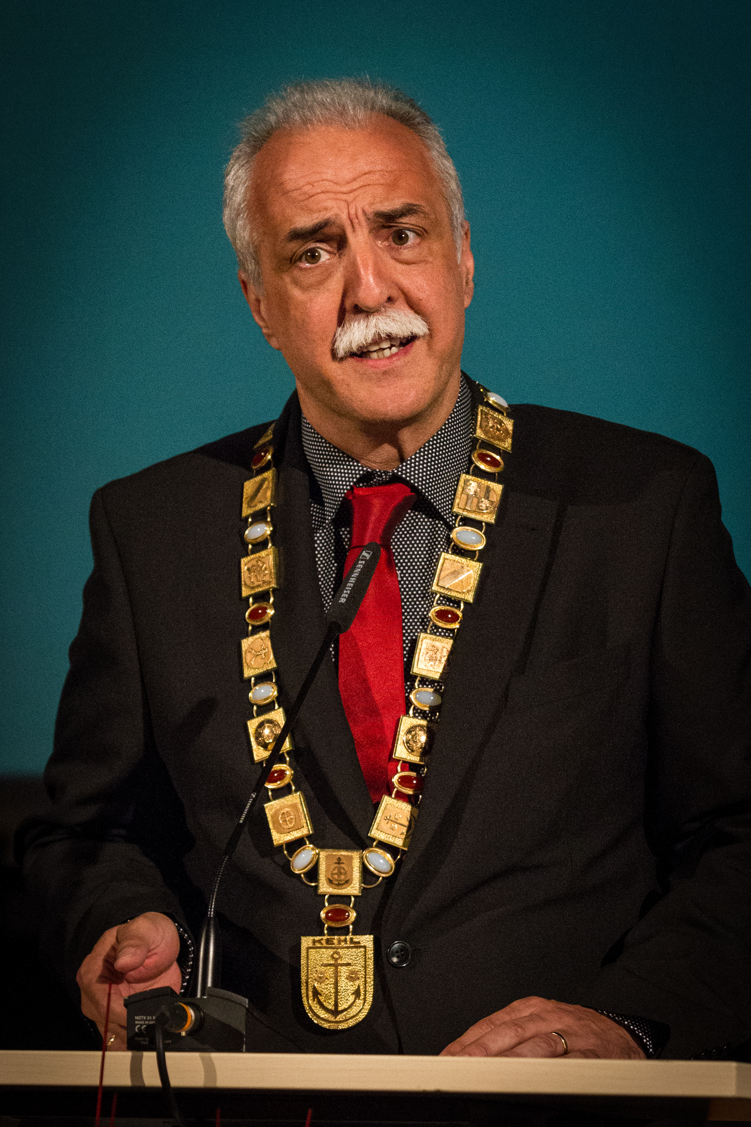 Toni Vetrano, né le 12 mars 1964, est un homme politique allemand, maire de la ville Kehl.